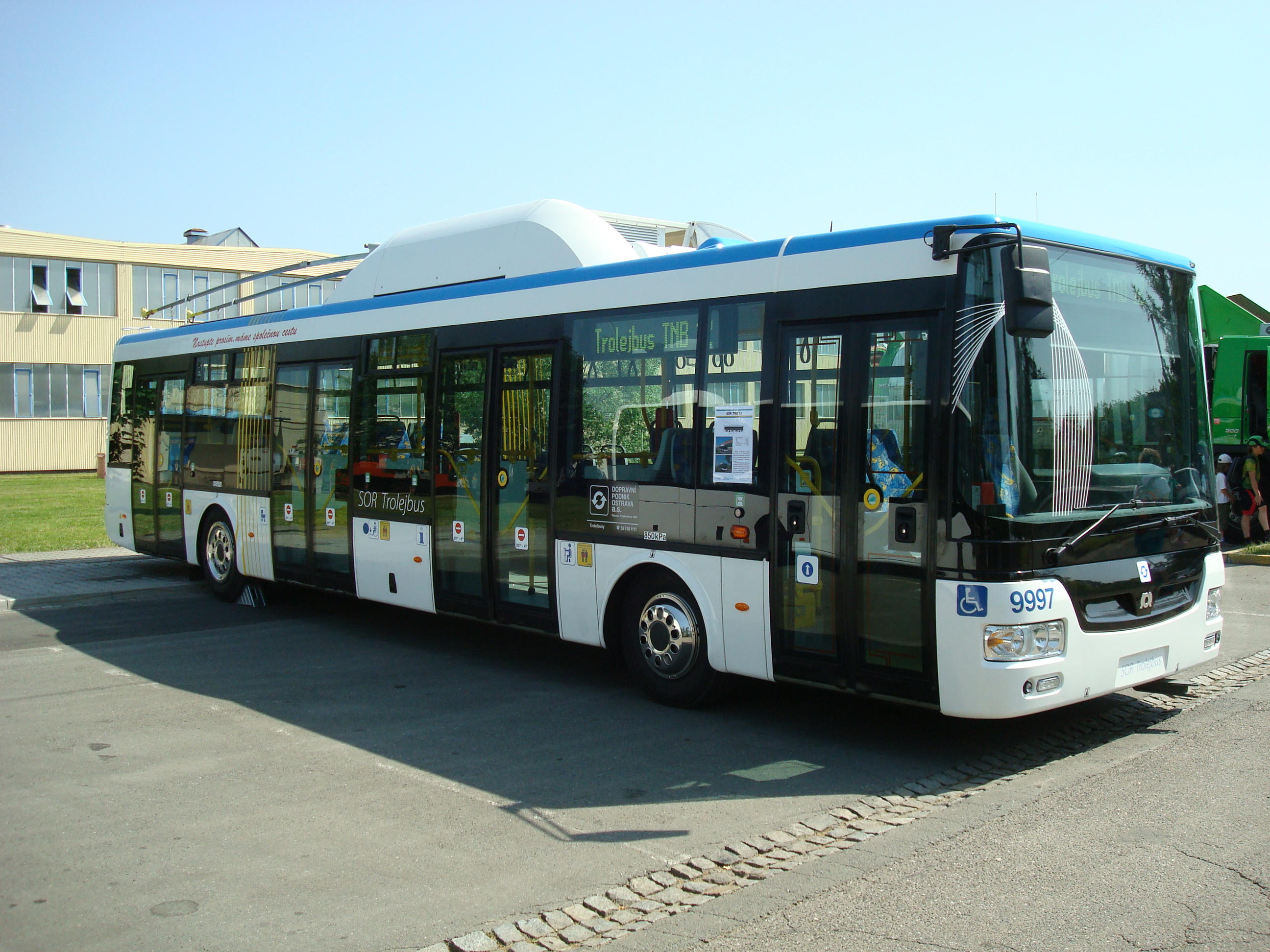 Ostrava